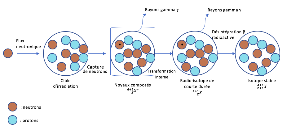 Activation neutronique d'un atome